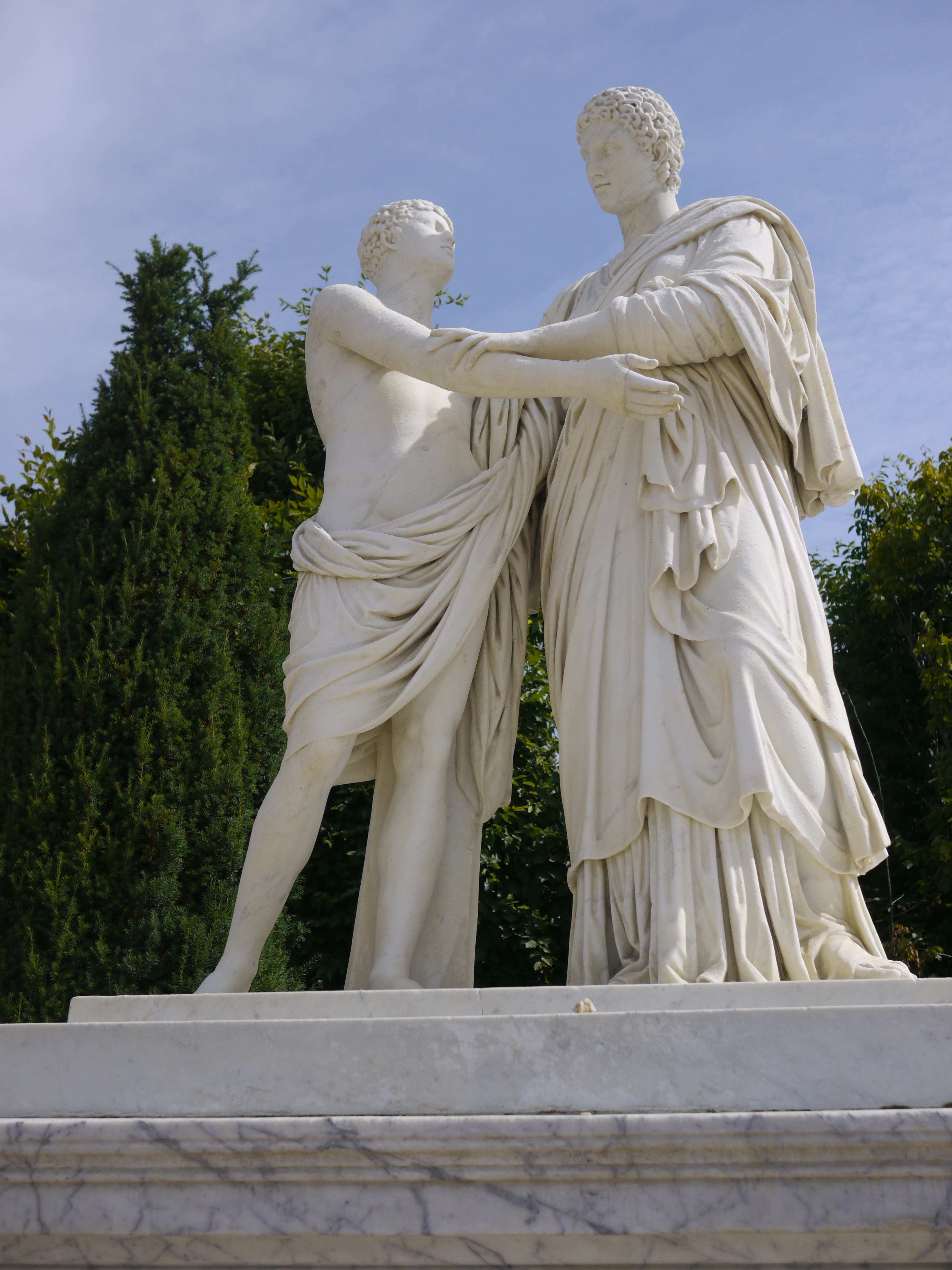 Demi-lune du Parterre de Latone - Papirius et sa mère (1685-1688) par Martin Carlier et Michel Mosnier.